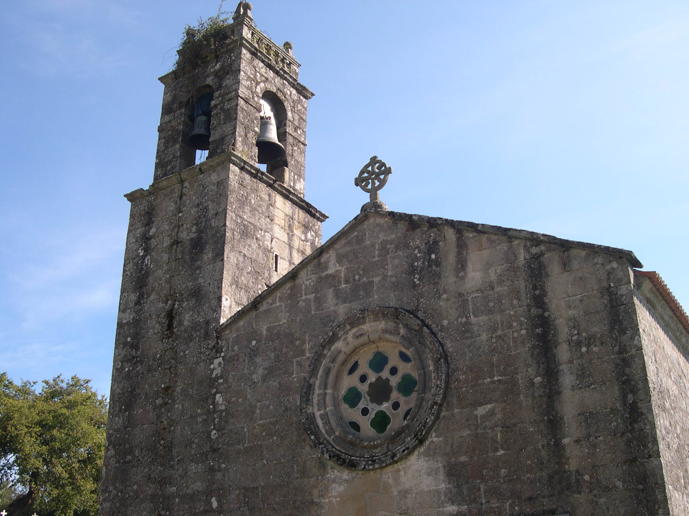 Fachada da Igrexa románica de Santa María de Bemil